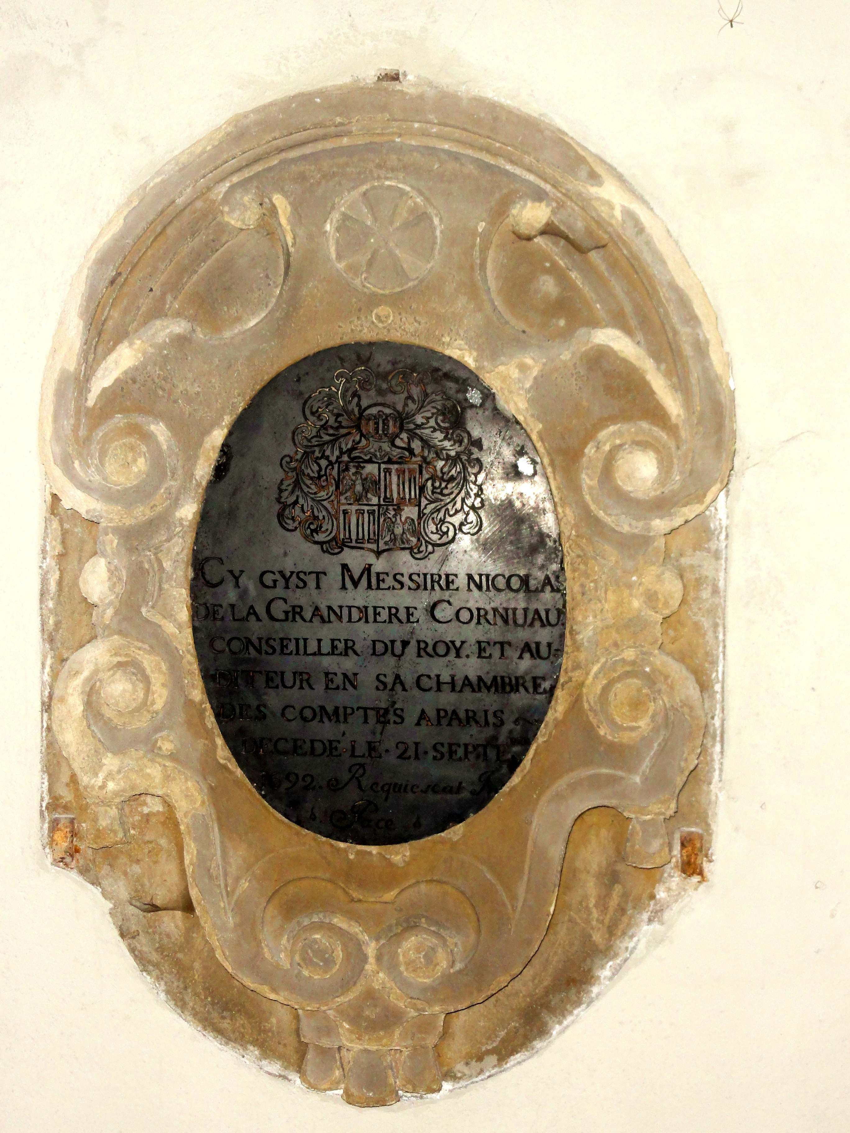 Epitaphe pour Nicolas de la Grandière Cornuau, mort le 21 sept. 1692.